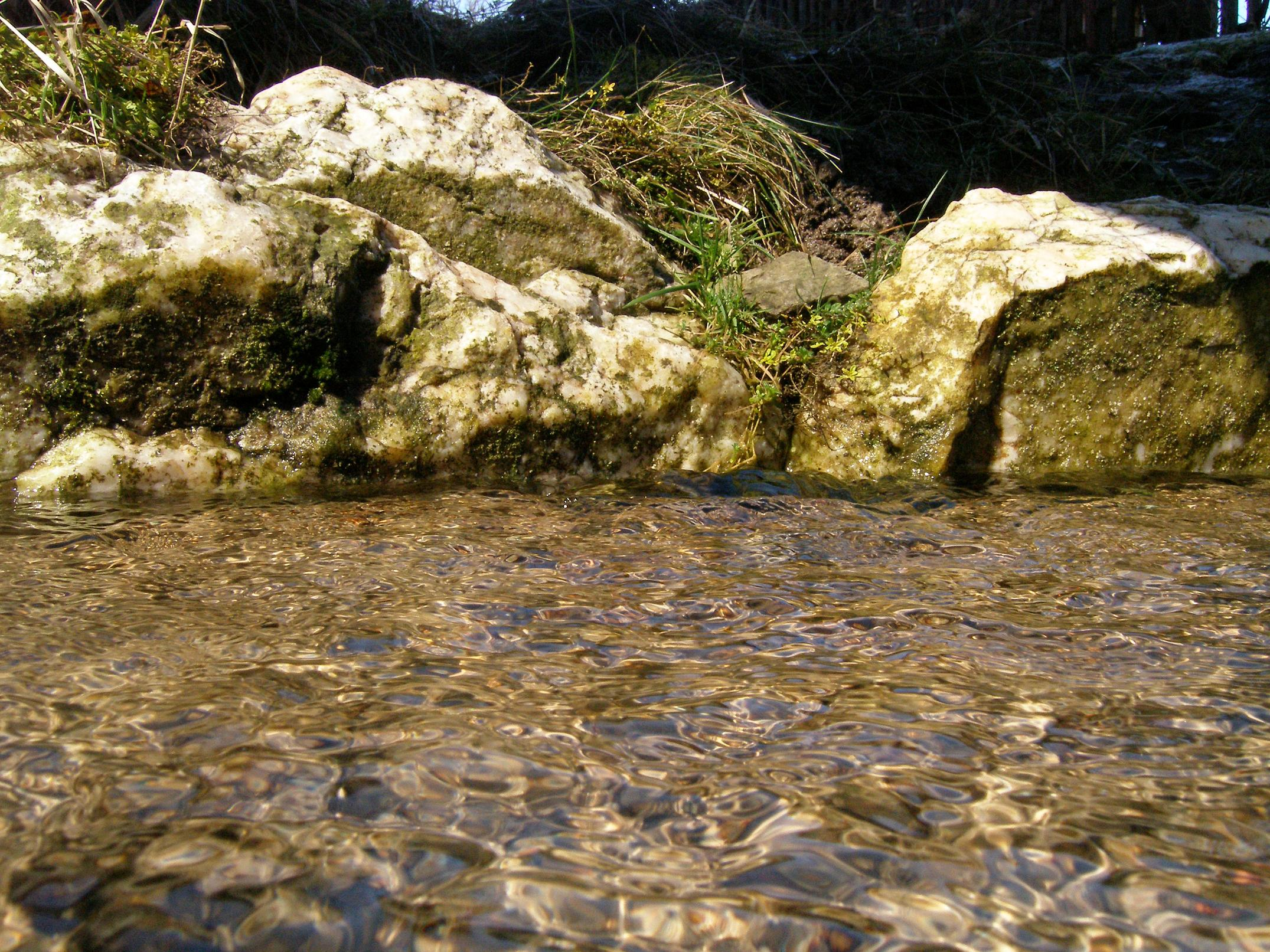 Prameny řeky Střely, dolní